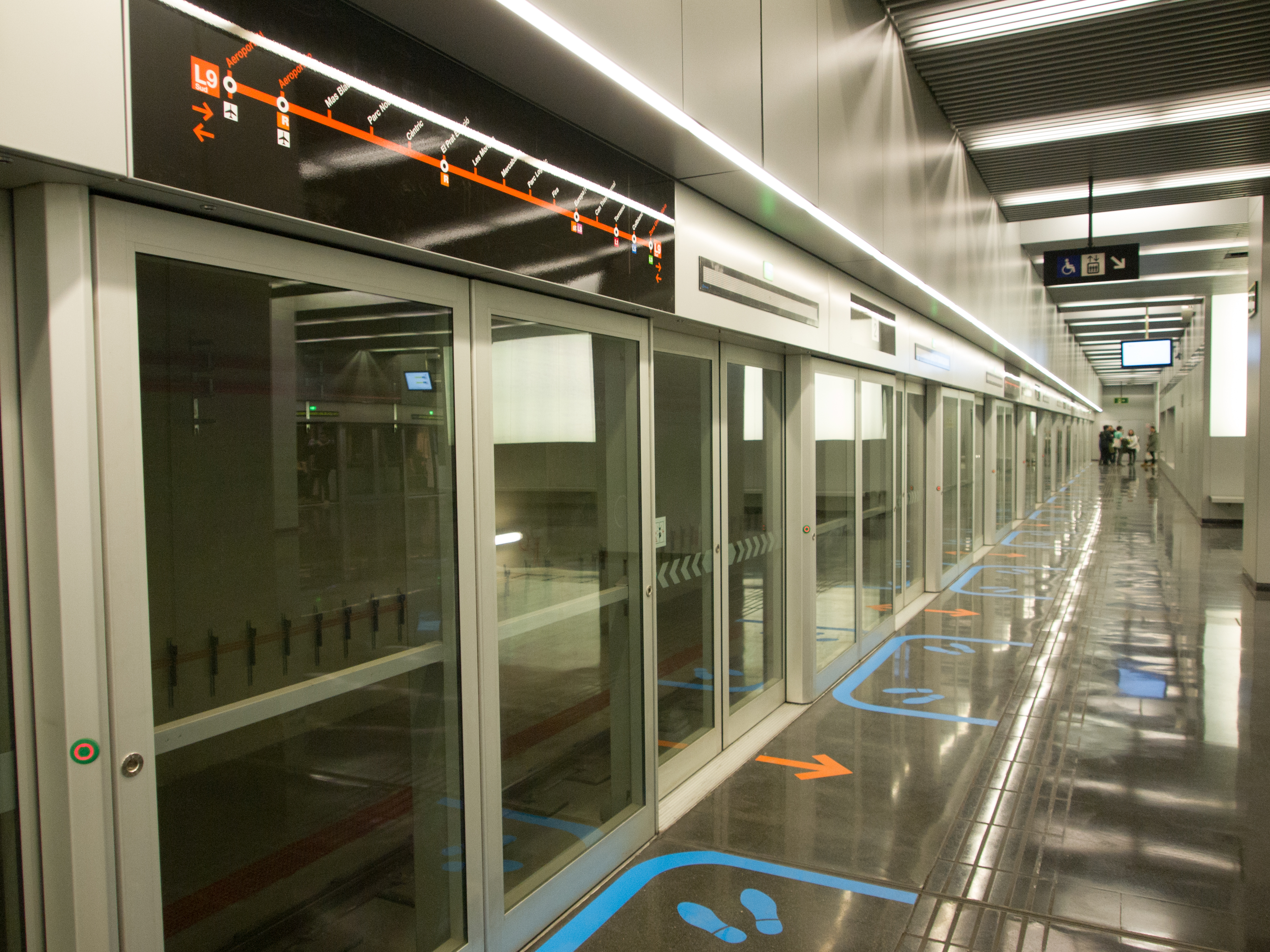 Andana estació "Aeroport T1" de la Linia L9 del metro de Barcelona